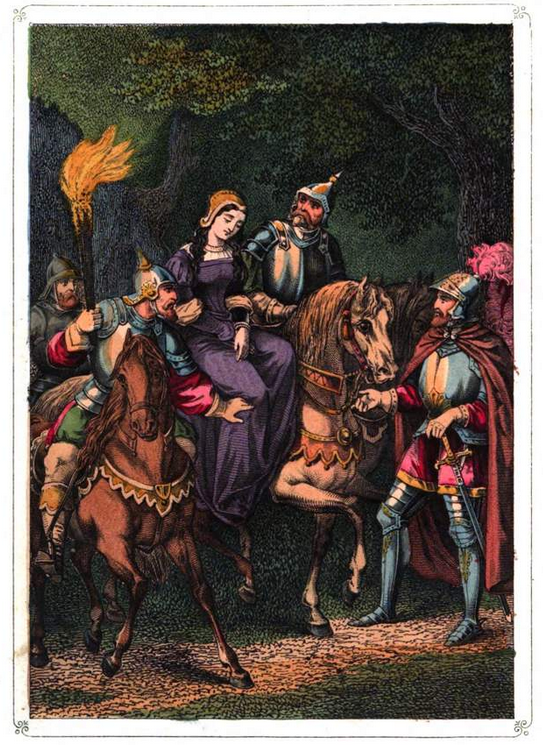 aus Michael Lehmanns Jugendbuch "Wolfrat von Veringen", Lampart-Verlag 1856